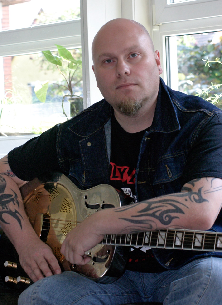 heavy metal-musiker Ferdy Doernberg